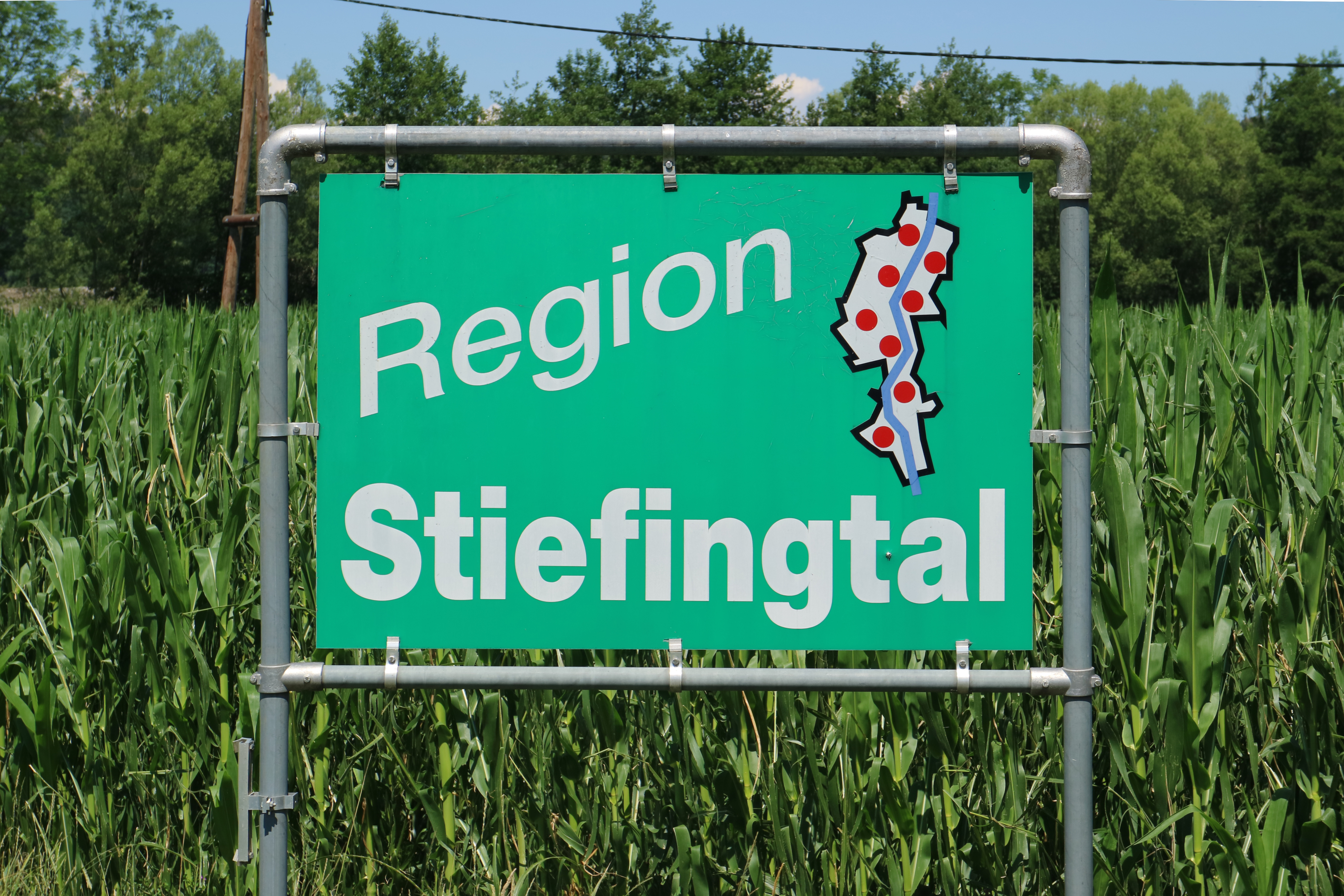 Straßental in der Region Stiefingtal bei Rettenbach, Gemeinde Pirching am Traubenberg, Steiermark